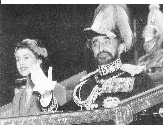 קיסר אתיופיה היילה סלאסי ומלכת בריטניה אליזבת השנייה.